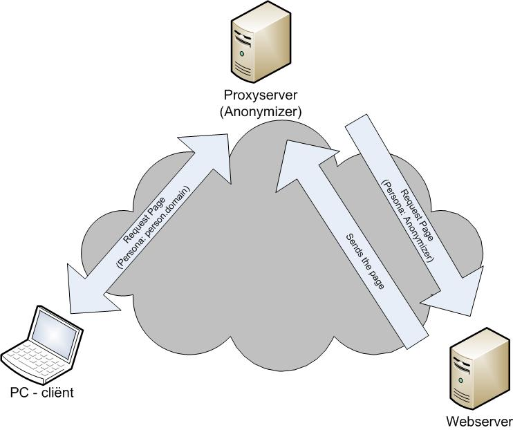 Illustratie van de werking waarbij de cliënt via een service voor anoniem surfen een webpagina opzoekt.